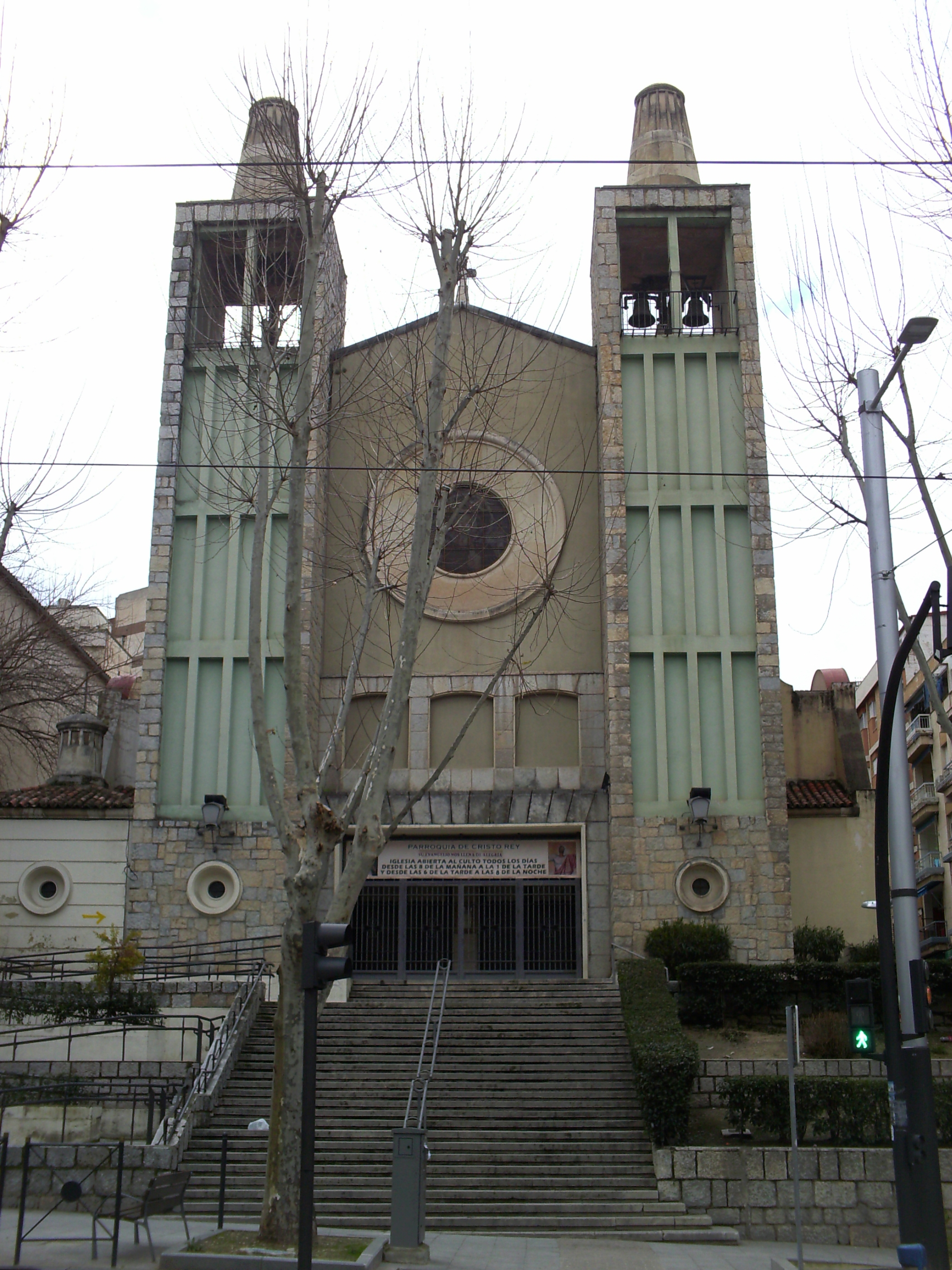 Fachada de la Iglesia de Cristo Rey de Jaén. Se ve el cableado del tranvía, lo siento.